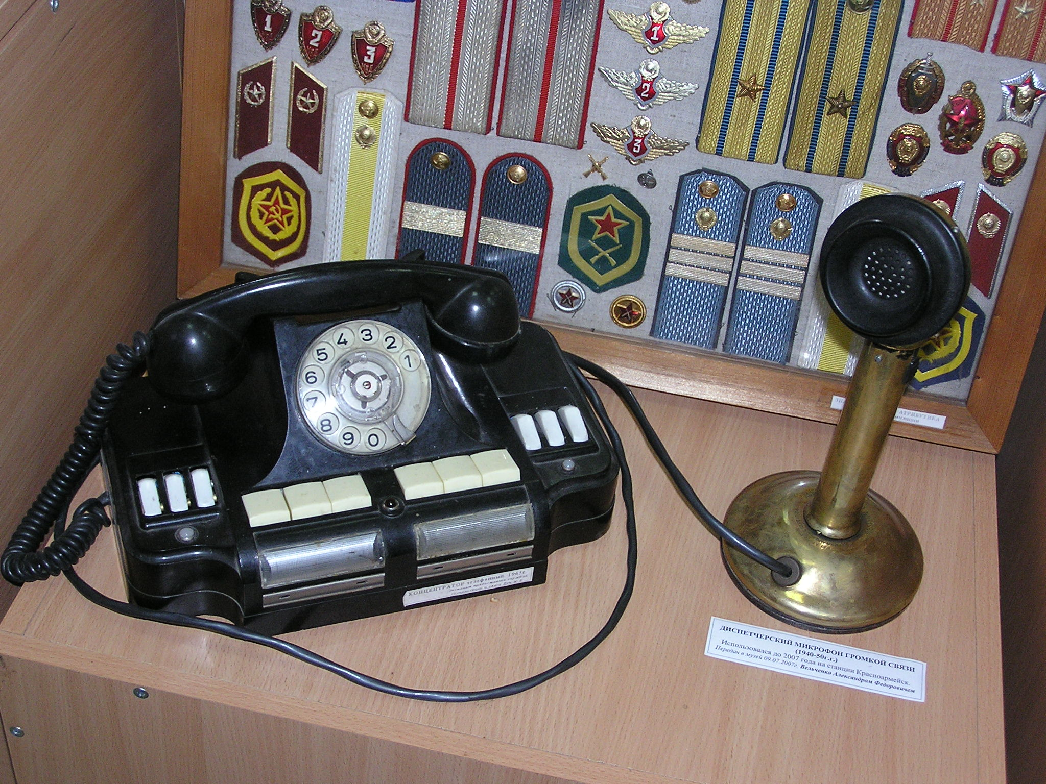 Музей истории и развития Донецкой Железной дороги. Концентратор телефонный КД-6 (1965) и диспетчерский микрофон громкой связи (1940-1950)